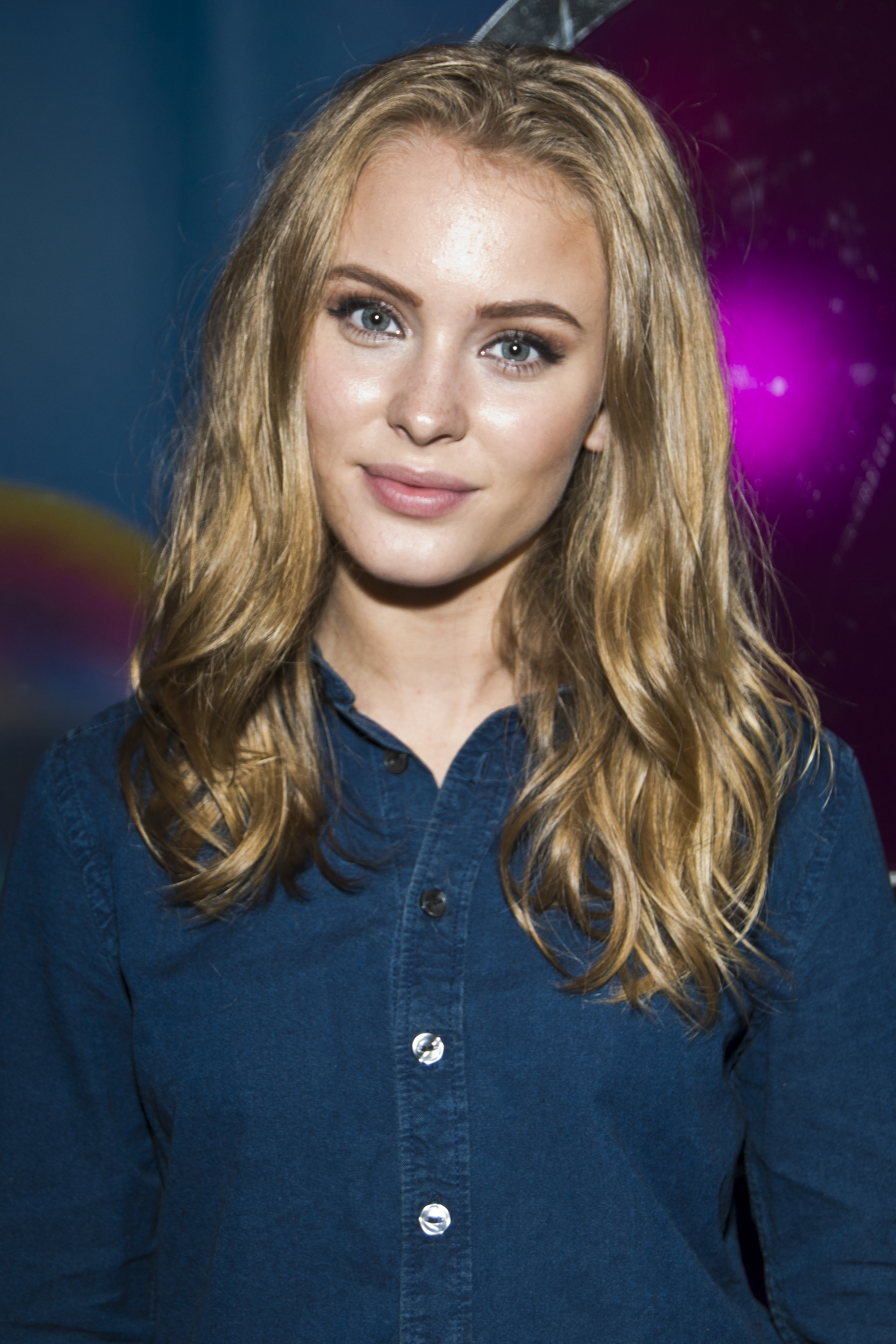 Zara Larsson på Sommarkrysset, Gröna Lund i Stockholm